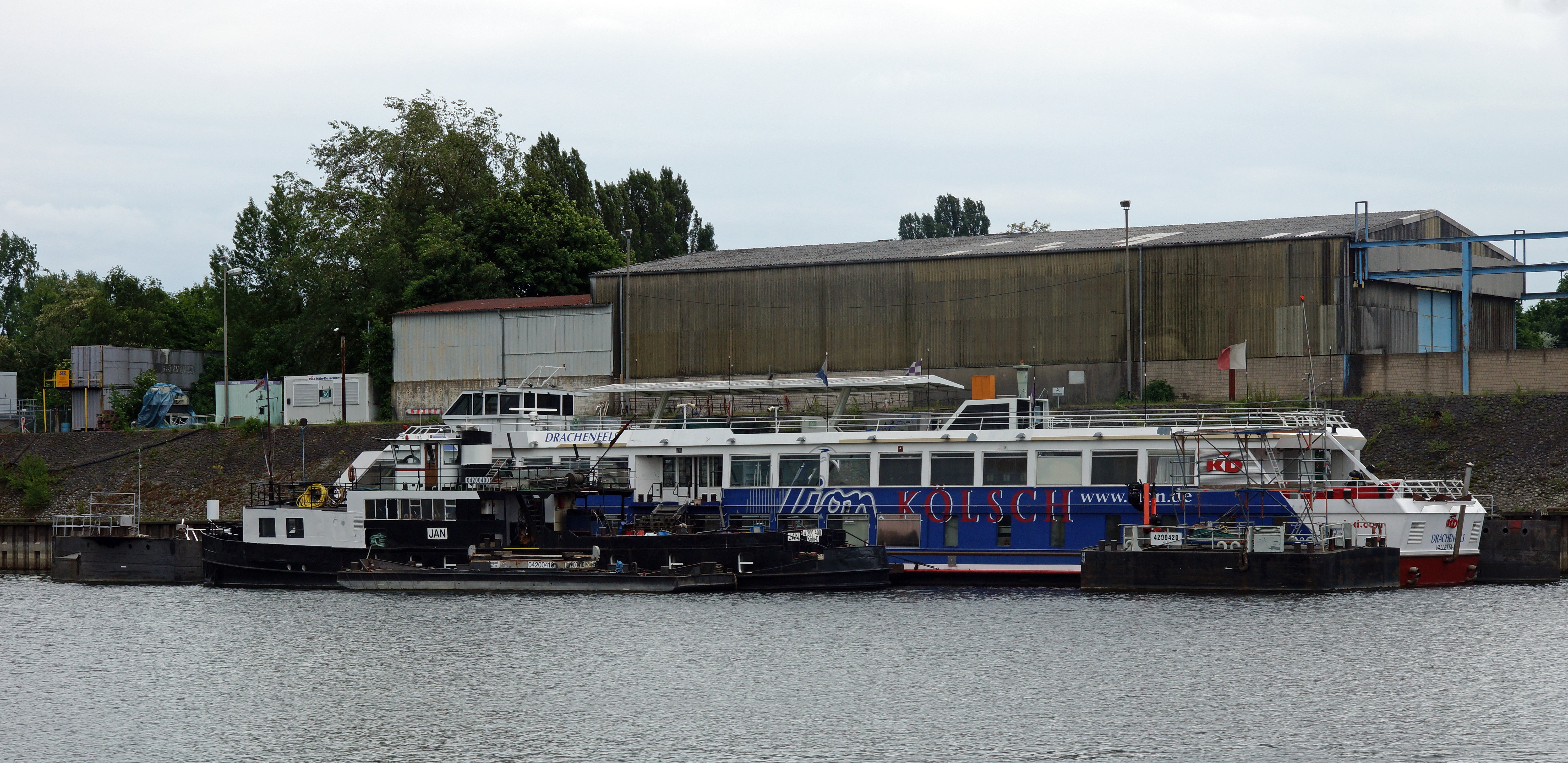 Das von der Köln-Düsseldorfer im Niehler Hafen stillgelegte Fahrgastschiff Drachenfels, daneben das Arbeitsschiff Jan .